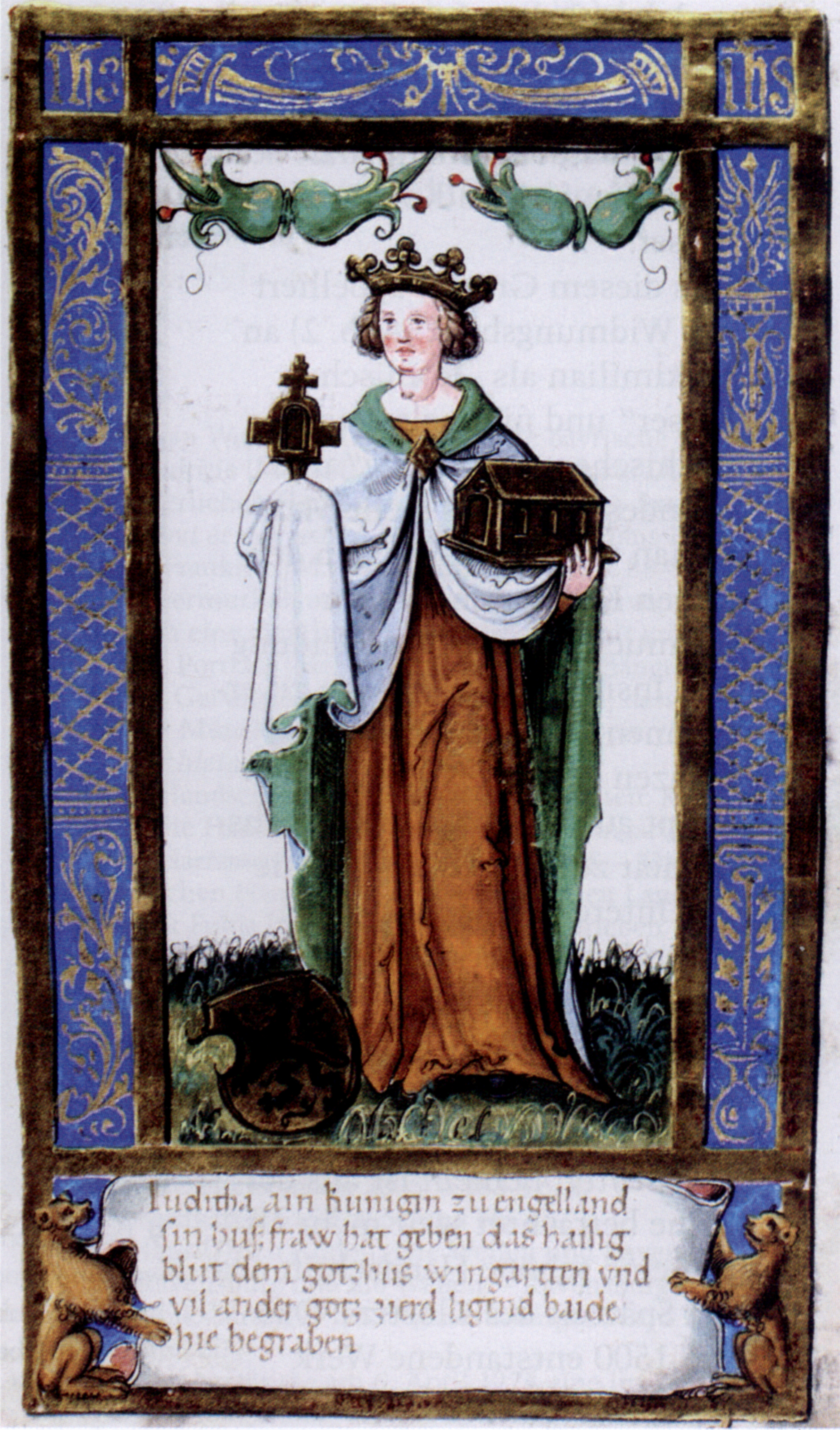 Stifterbüchlein, entstanden um 1500 für die Reichsabtei Weingarten, Stuttgart, Württembergische Landesbibliothek, Cod. hist. Q 584, fol. 26r, Judith, dritte Gemahlin Welfs IV., Stifterin eines reichen Kirchenschatzes, darunter die Weingartener Heilig-Blut-Reliquie